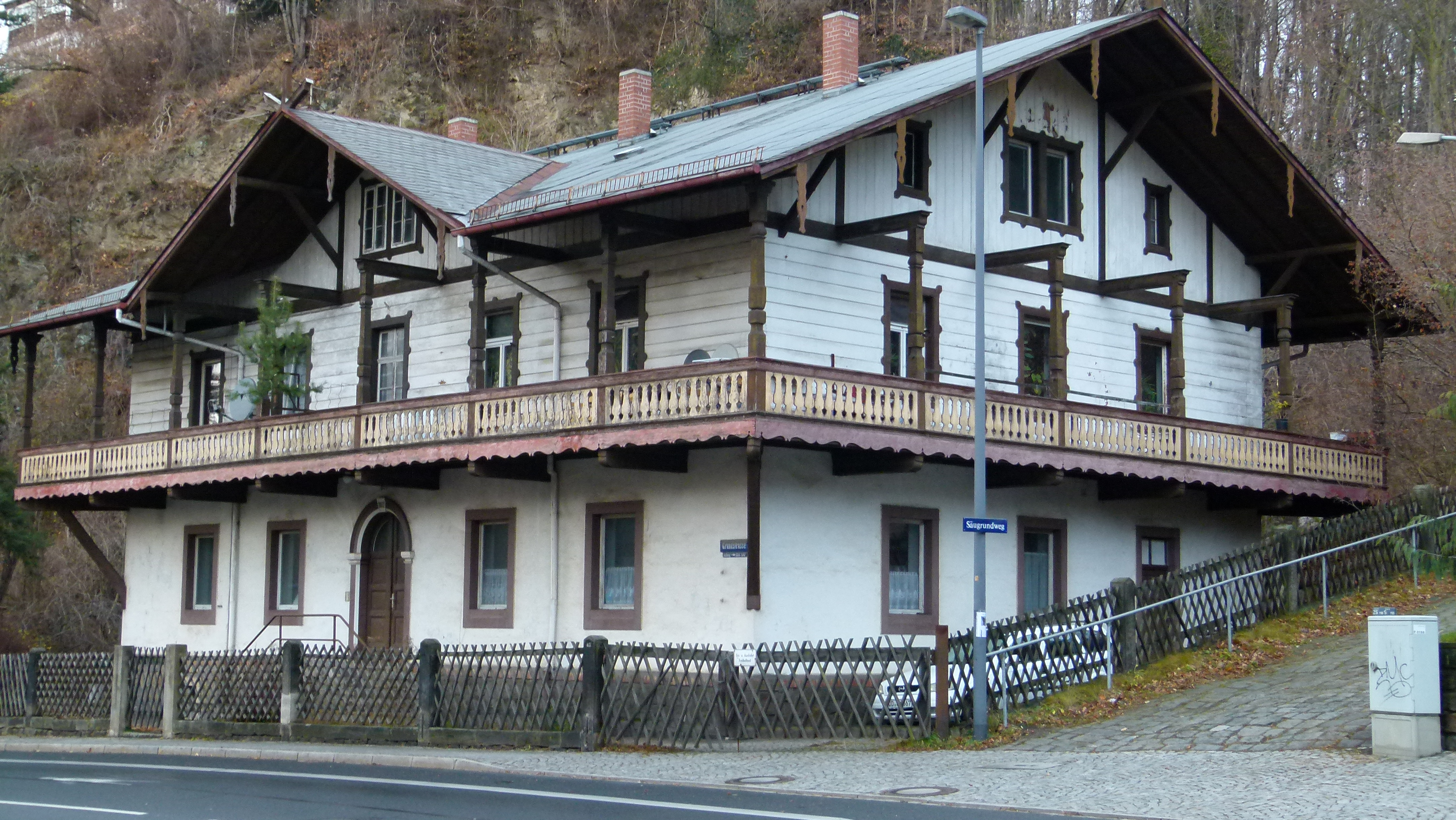 Denkmalgeschütztes Haus, Grundstraße 137, Loschwitz, Dresden